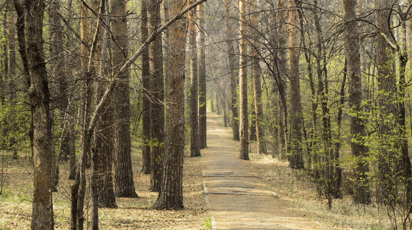 Курорт Ангара, Иркутск This image is related to the protected area of Russia number 3810072